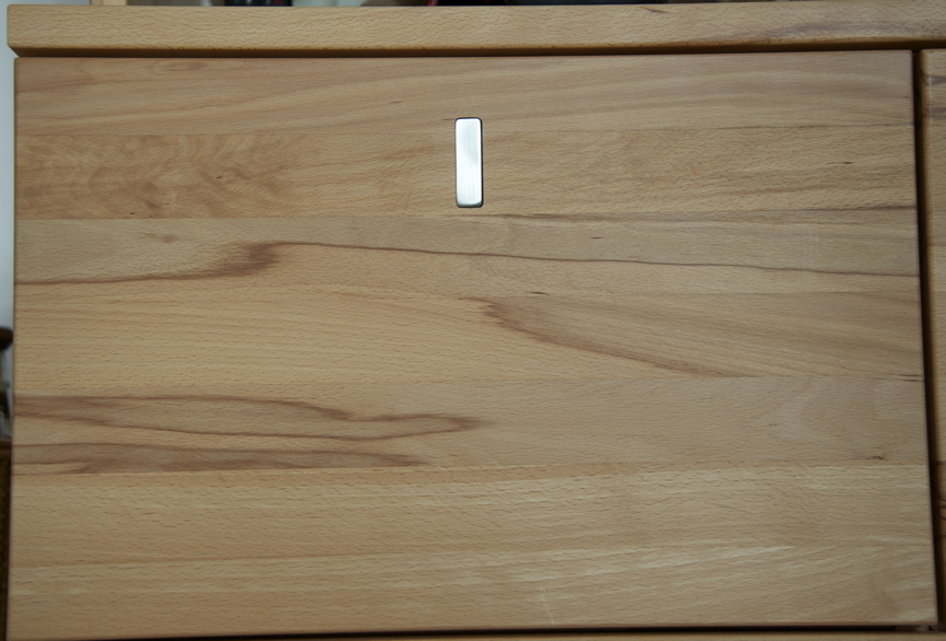 Abbildung einer Schublade aus Kernbuche